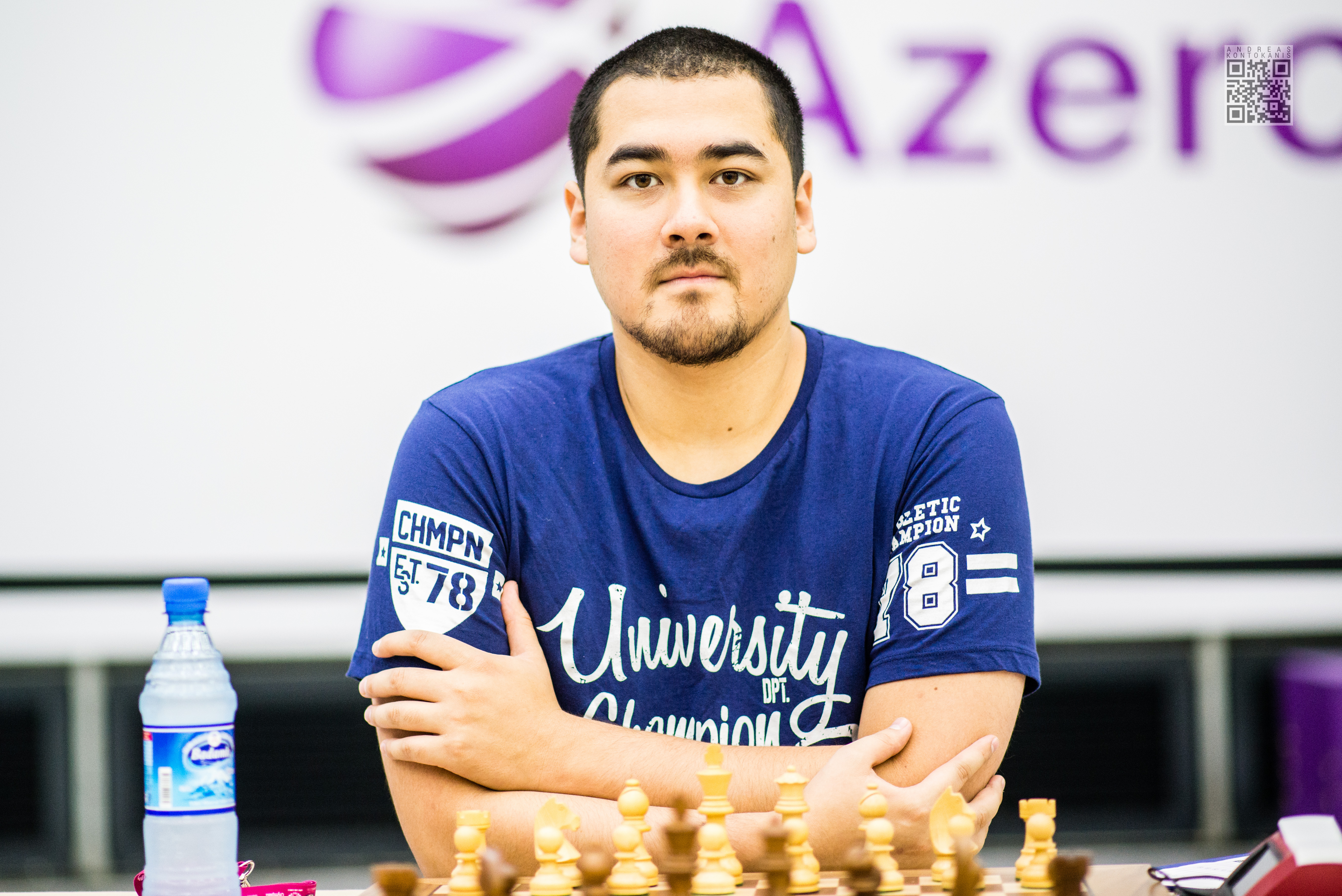 Fier Alexandr